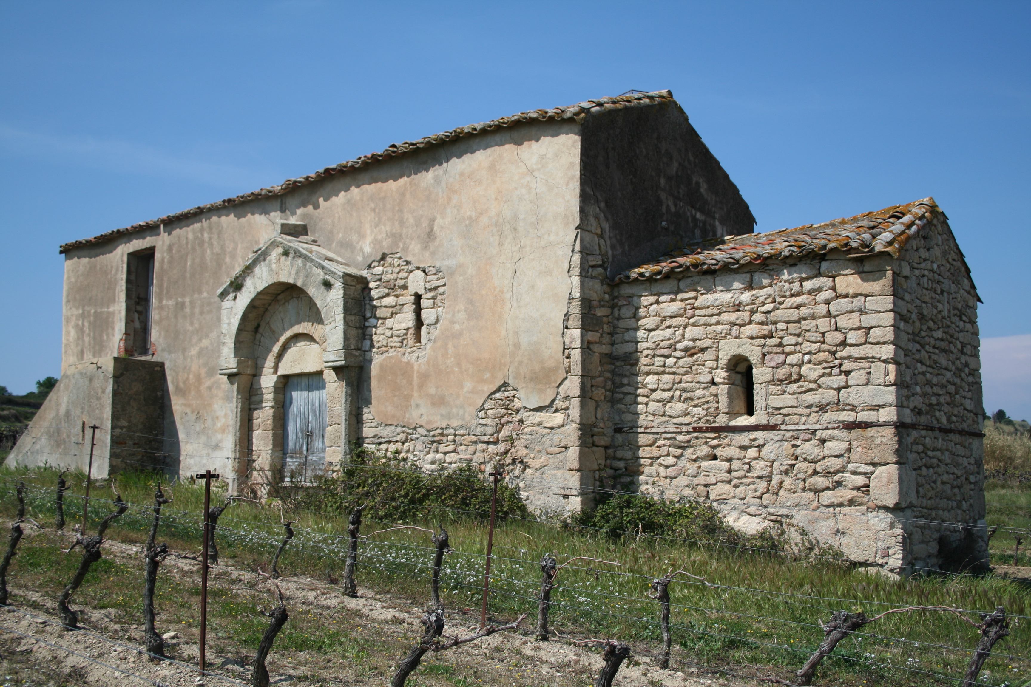 Roujan (Hérault) - église préromane Saint-Nazaire